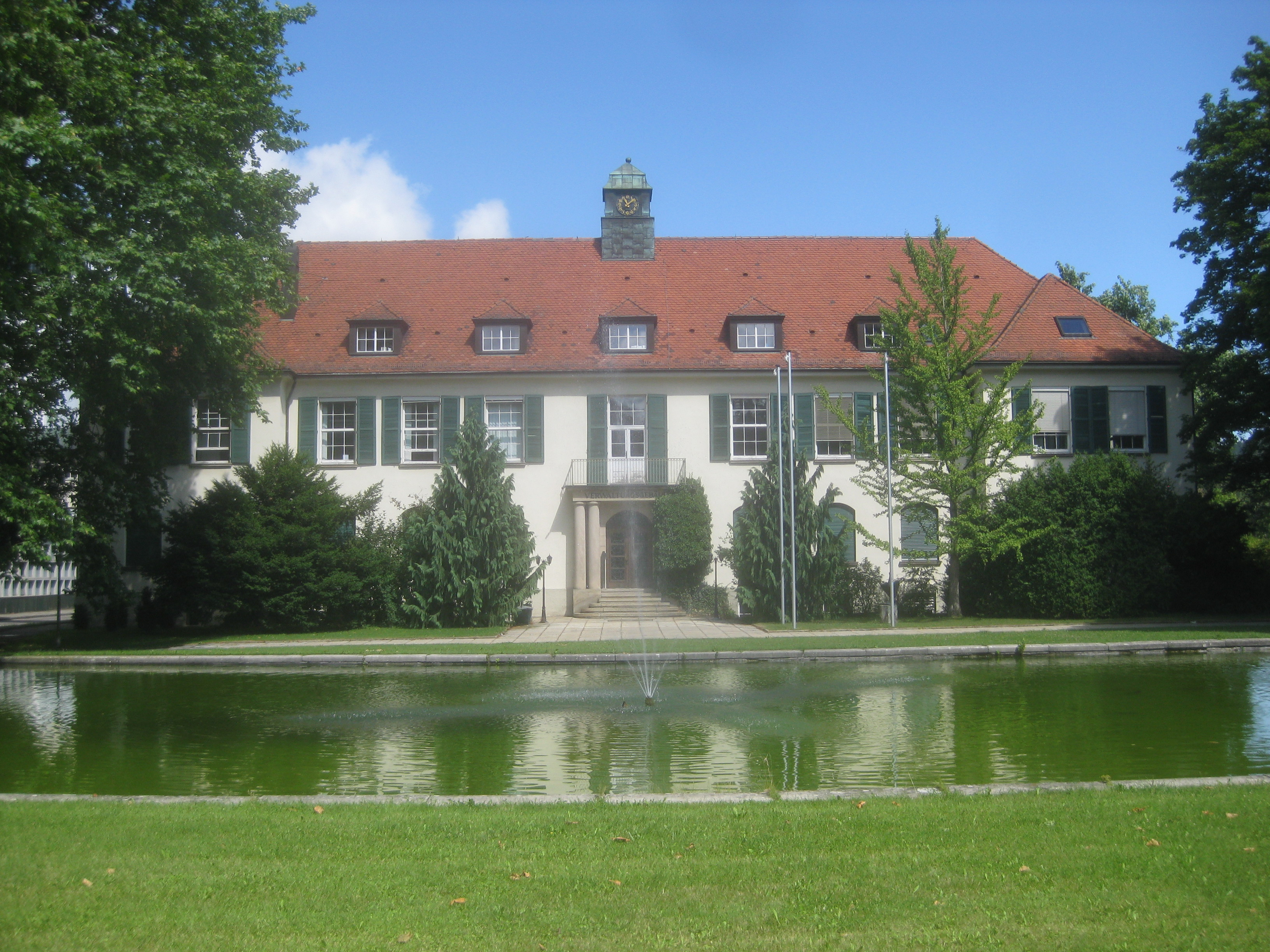 Papierfabrik Scheufelen, Verwaltungsgebäude, Oberlenningen, Adolf-Scheufelen-Straße 26. Architekt: Albert Eitel (Um- und Erweiterungsbau), Bauherr: Papierfabrik Scheufelen.